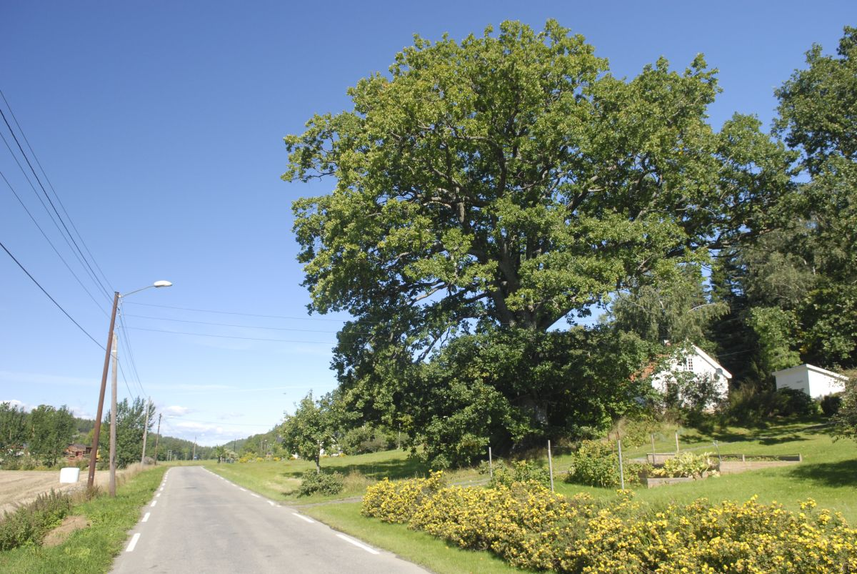 Torødeika står fritt og fint i landskapet.